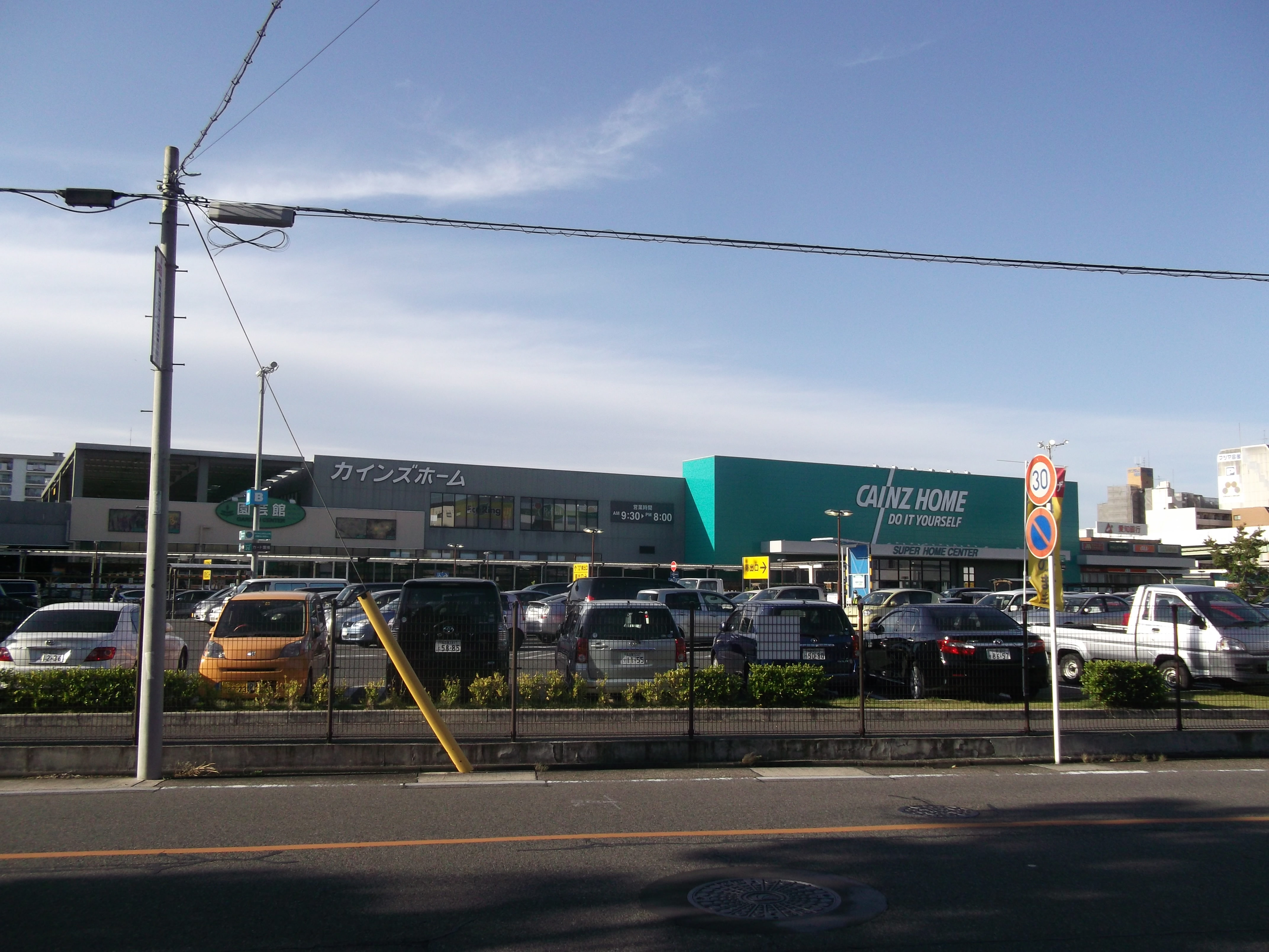 名古屋市瑞穂区新開町のカインズホーム堀田店を南側公道から写す